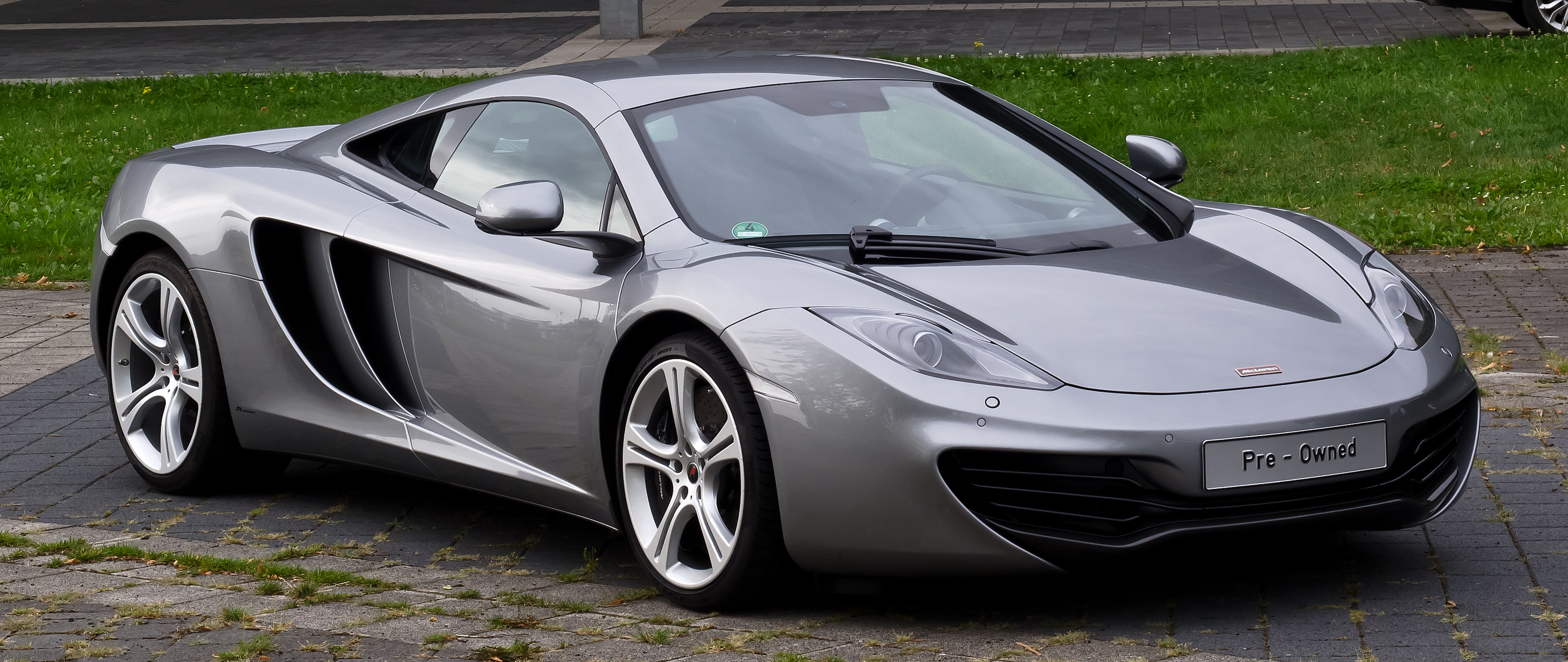 McLaren MP4-12C